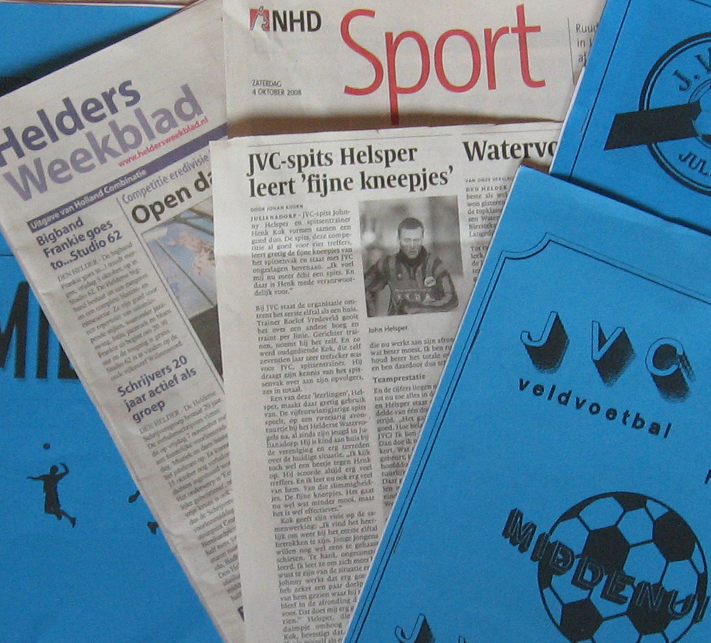 JVC in de media; Noordhollands Dagblad, Helders weekblad en eigen clubblad Middenuit.